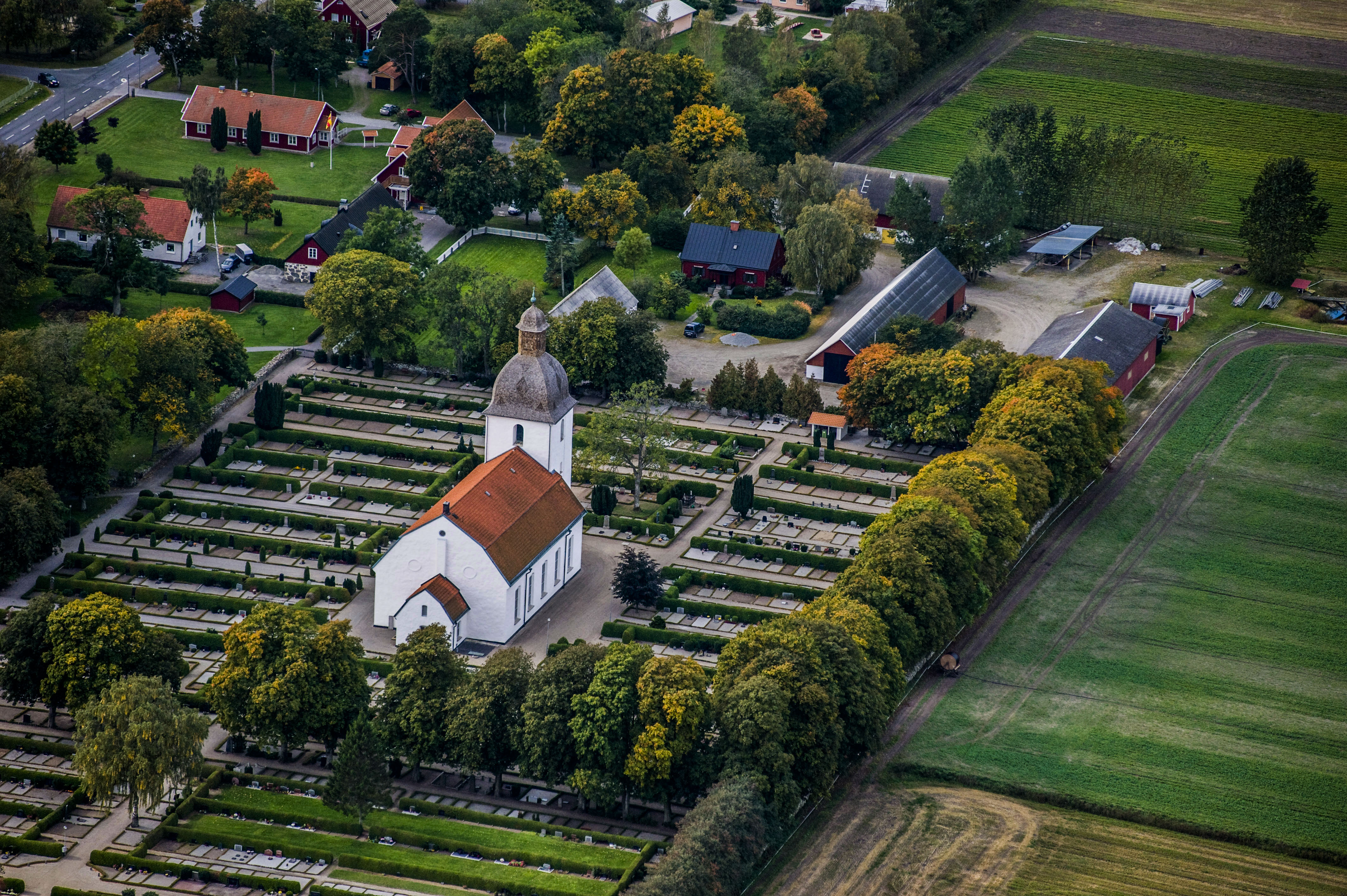 Mjällby kyrka från luften